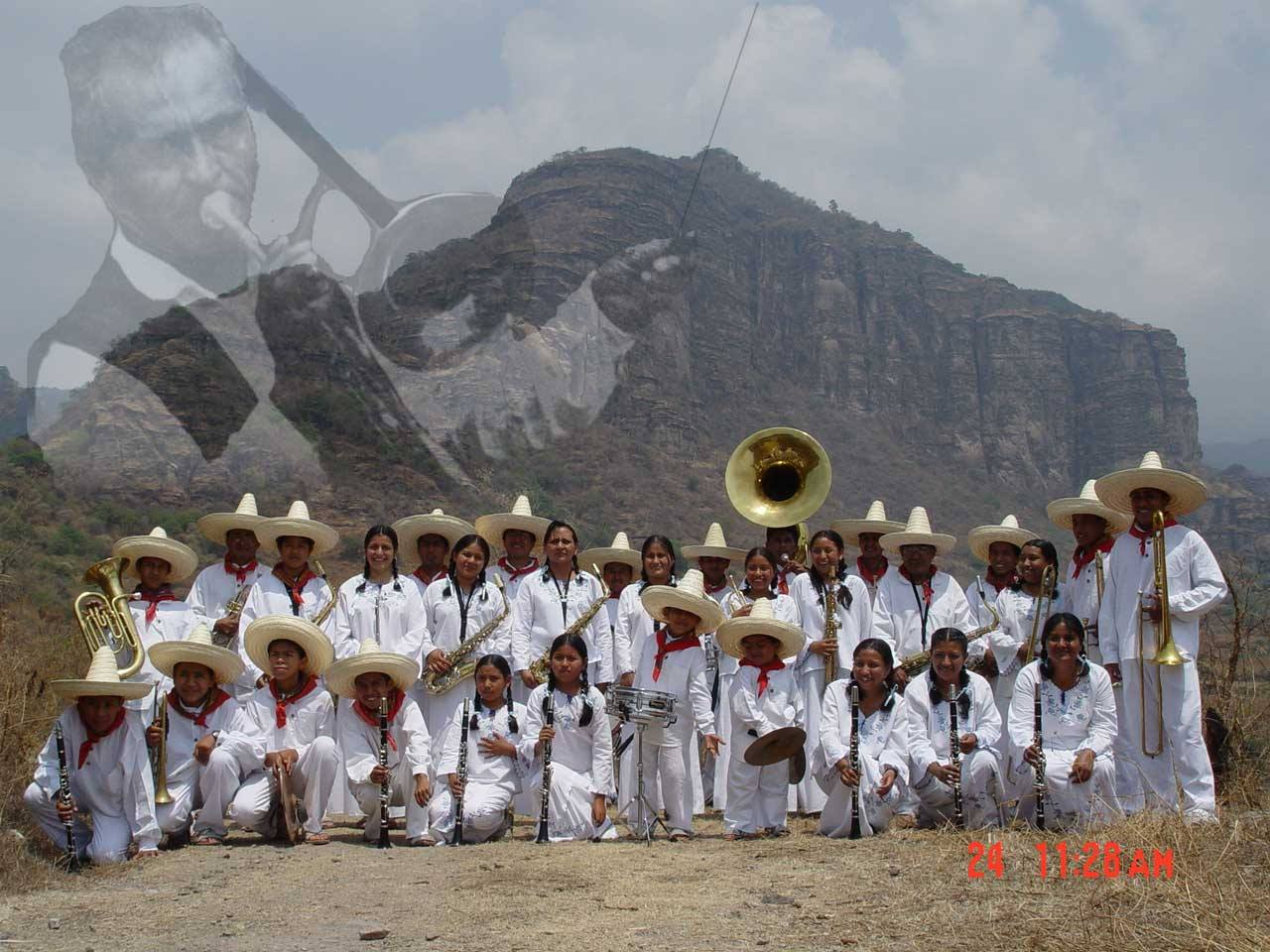 Mas de 145 años de cultura y tradicion.